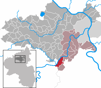 Burgen in Rhineland-Palatinate - district Mayen-Koblenz